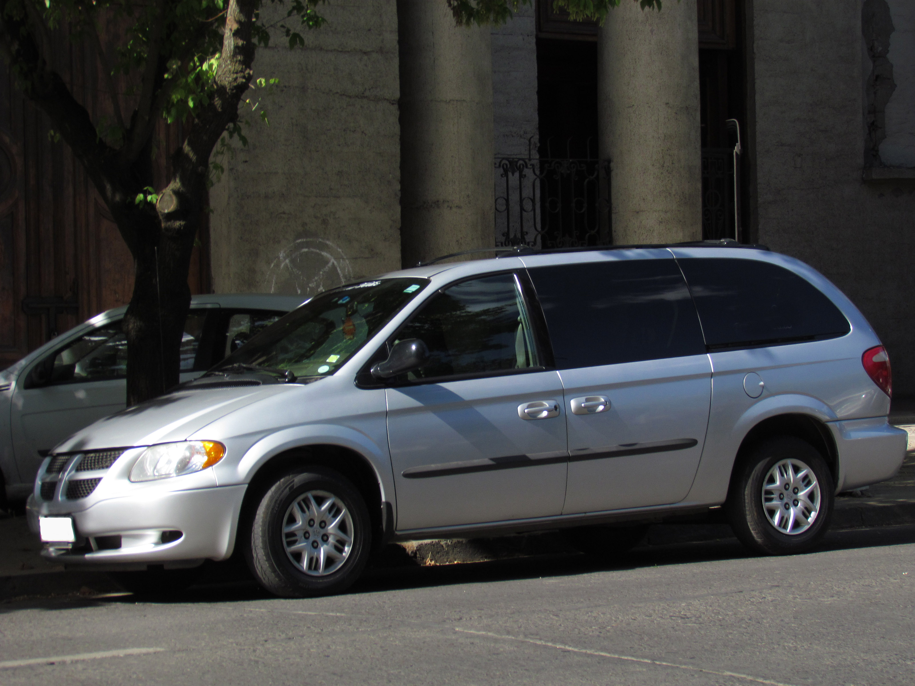 Dodge Grand Caravan 3.3 2003